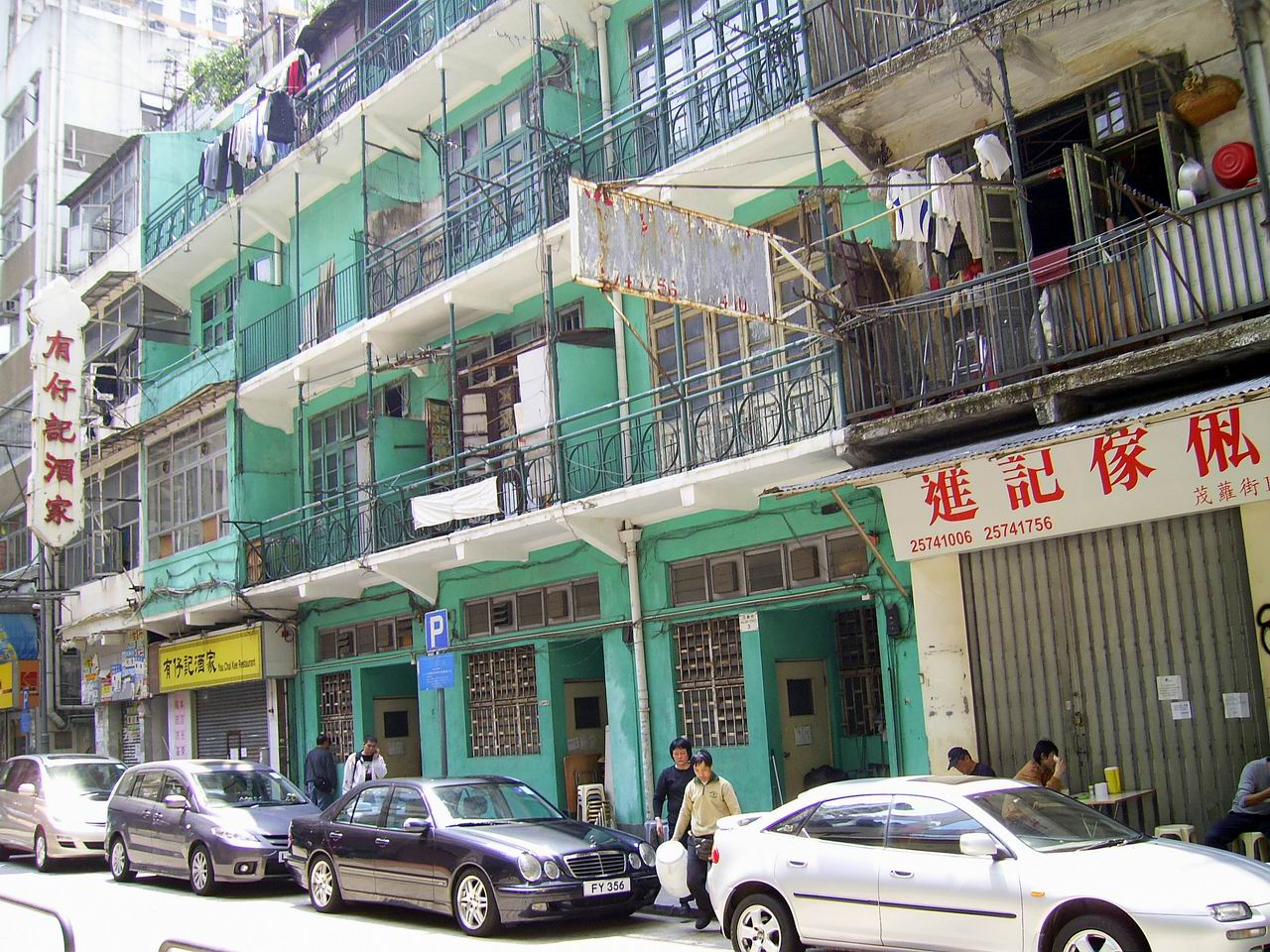 茂蘿街綠屋